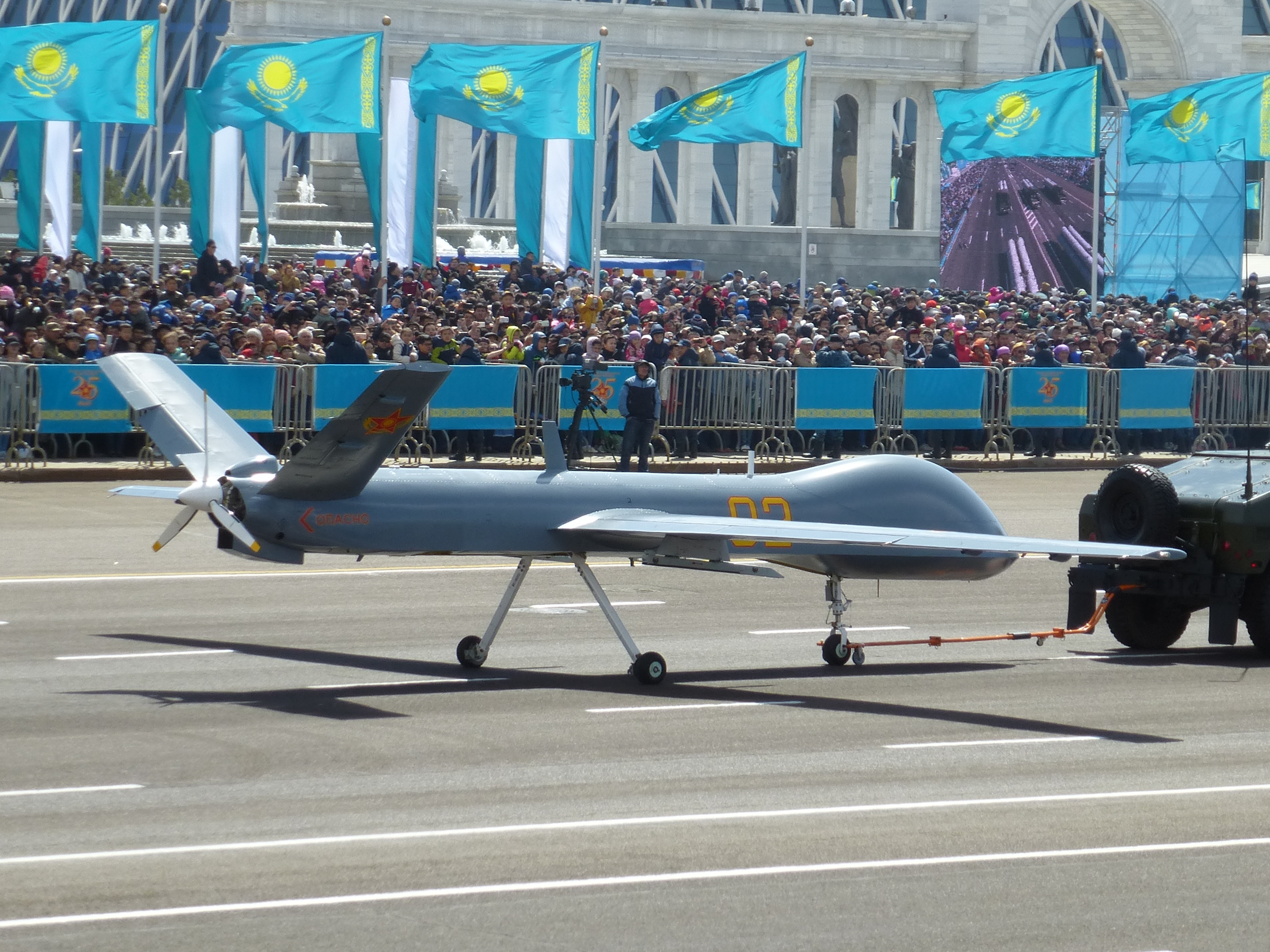 БПЛА Wing Loong на военном параде в Астане. 7.05.2017